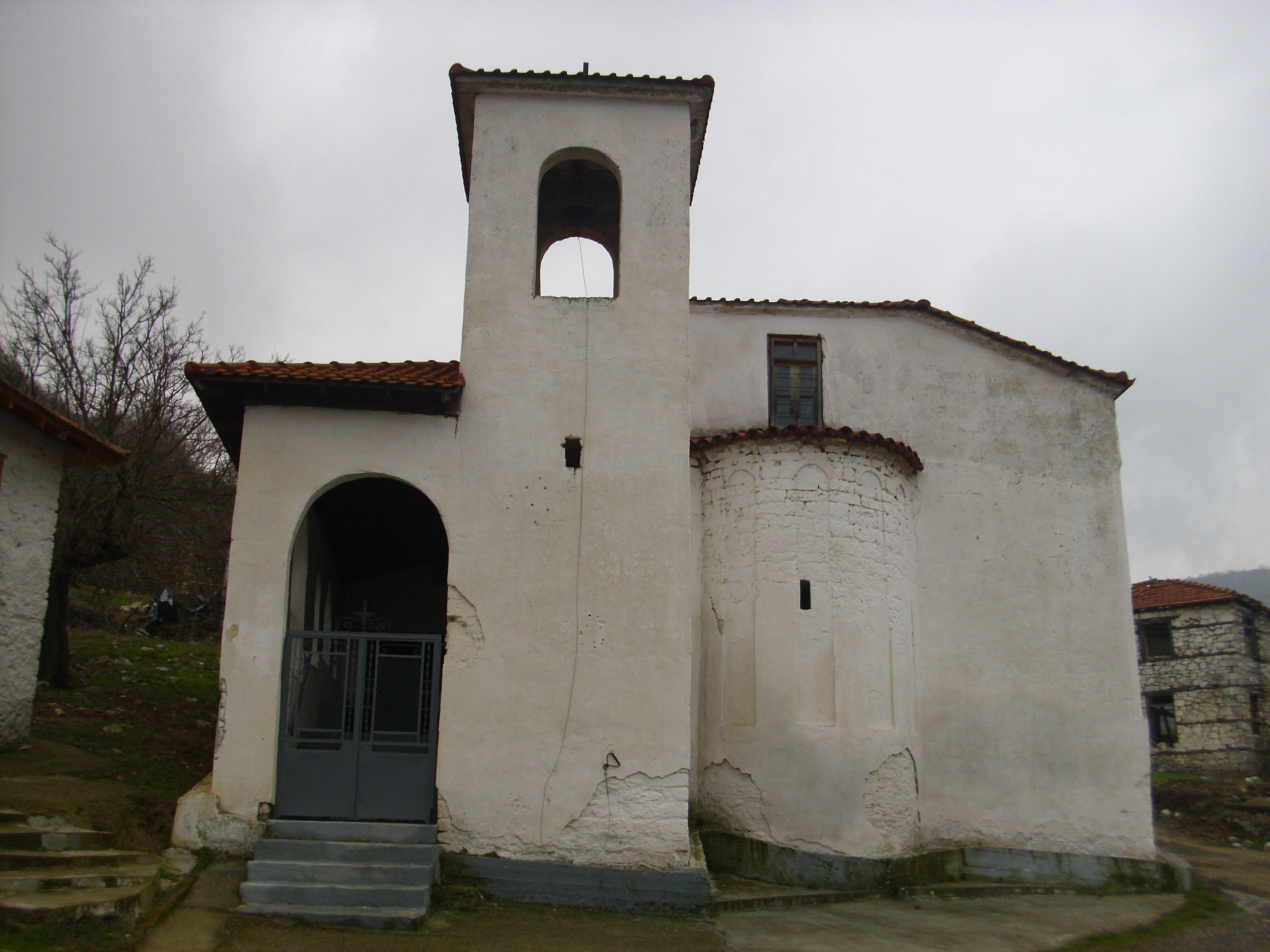 Църквата "Свети Николай" в село Корнишор, днес Република Гърция.